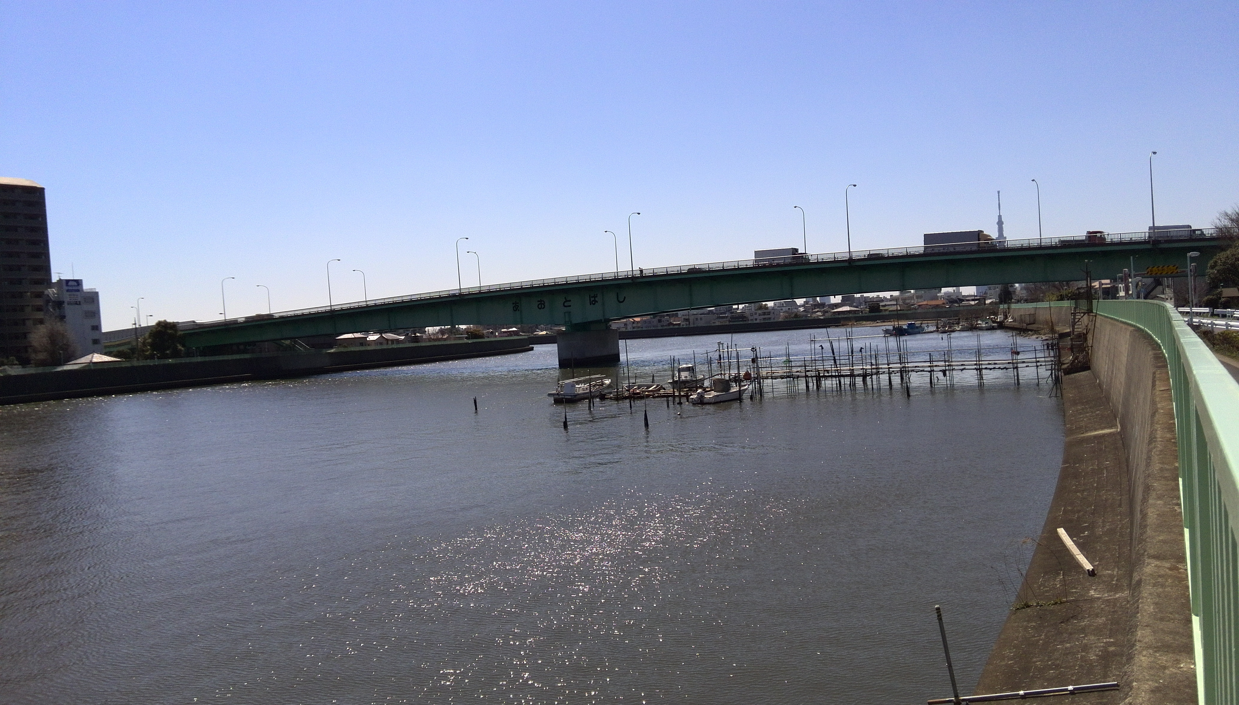 中川に架かる青砥橋（環状七号線）東京都葛飾区